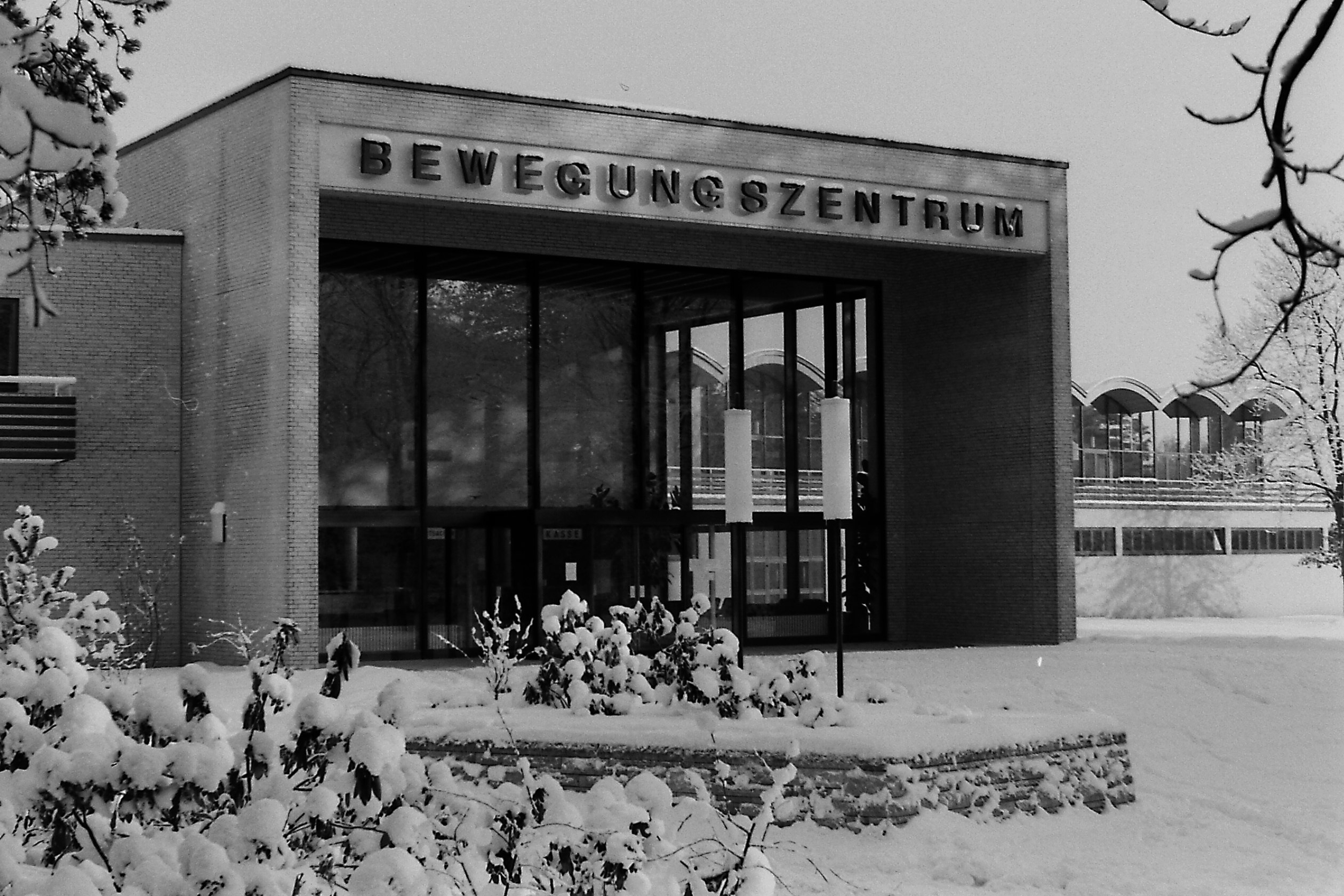 Deutschland (D) - Nordrhein-Westfalen (NW) - Kreis Lippe (LIP) - Bad Salzuflen: Eingang des Bewegungszentrums (heut VitaSol)